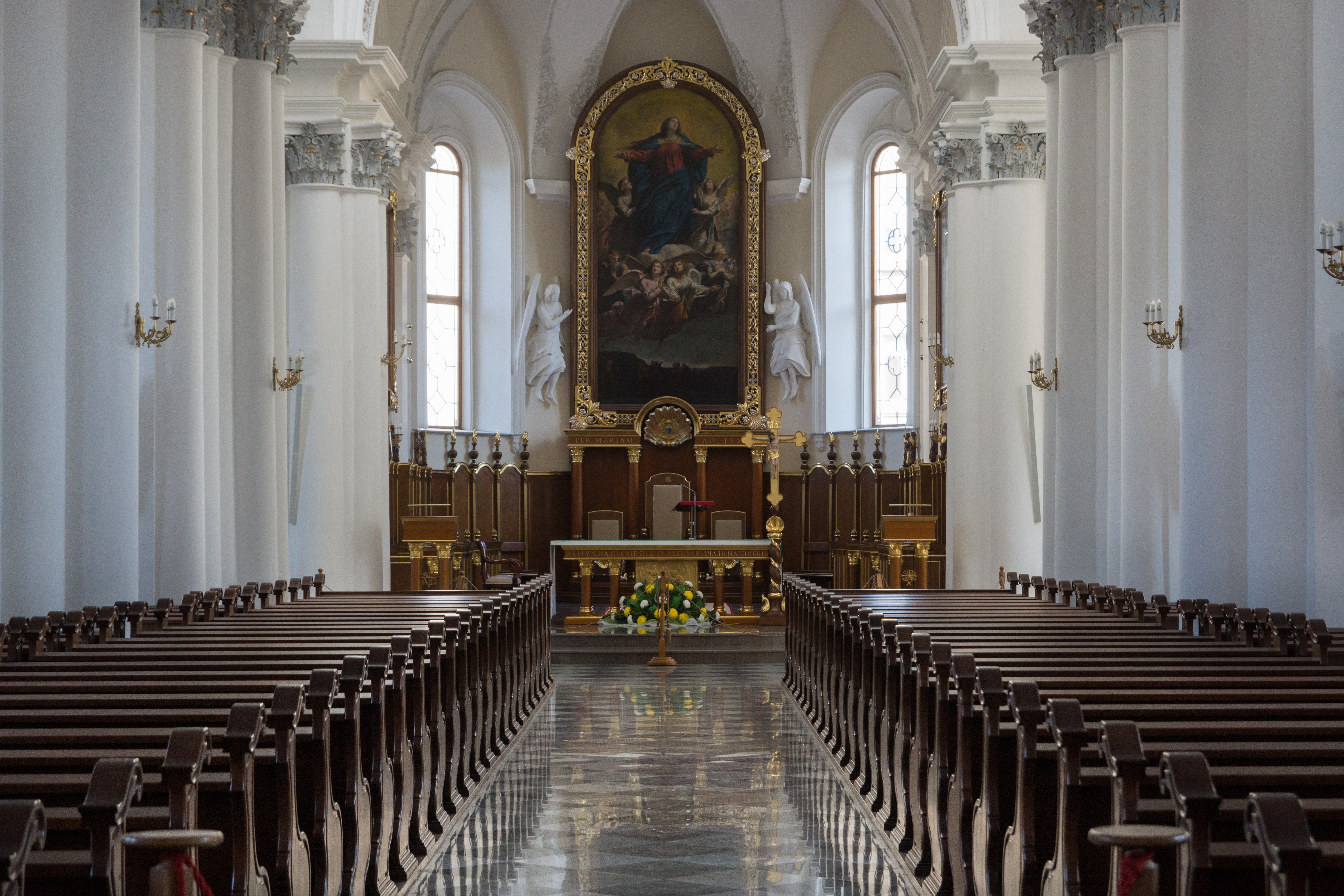 Собор (костьол) Римсько-католицький Успіння Пресвятої Богородиці, Одеса, Катерининська вул., 33